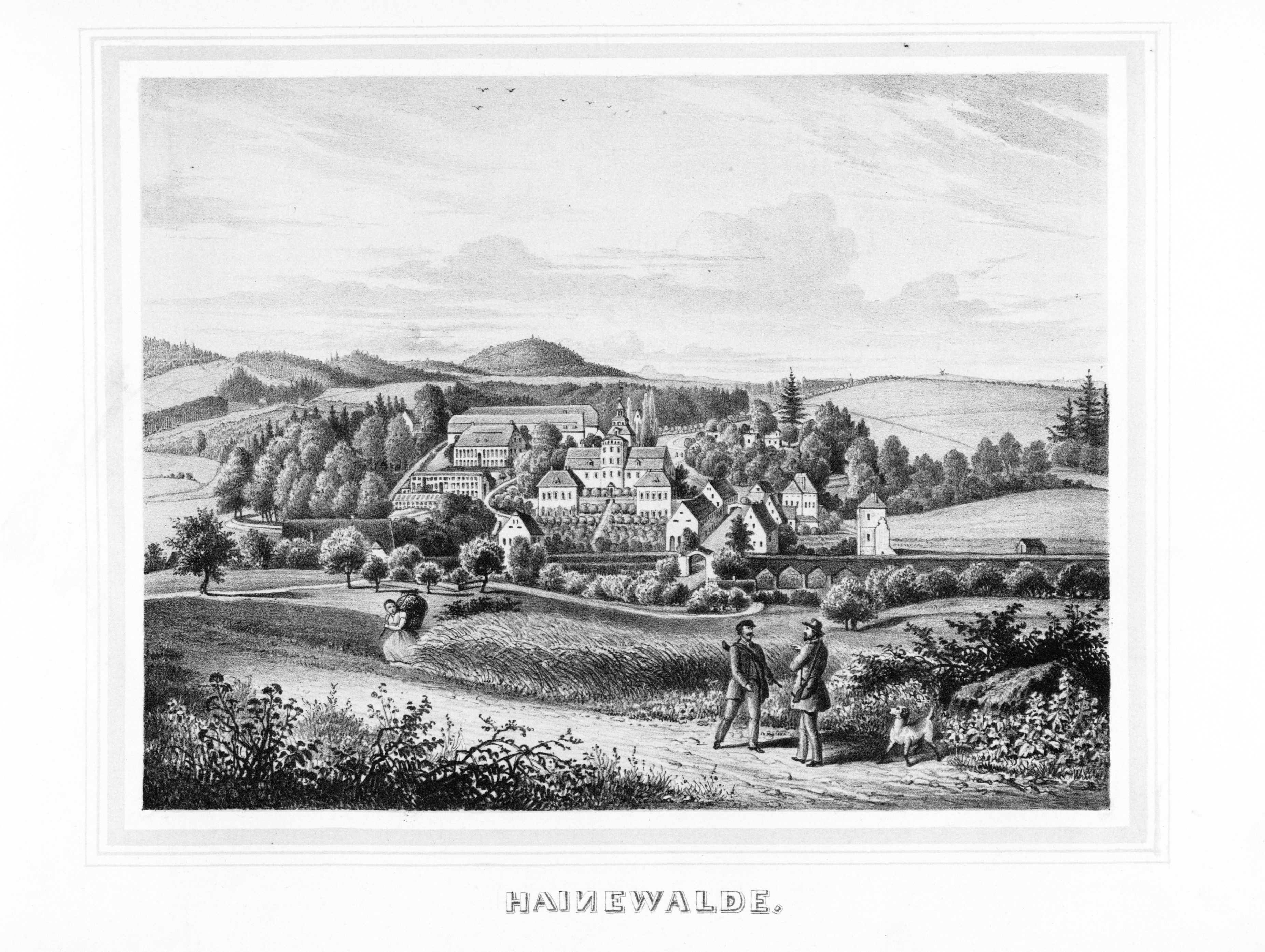 Hainewalde aus: Album der Rittergüter und Schlösser im Königreiche Sachsen Markgrafenthum Oberlausitz Section: III